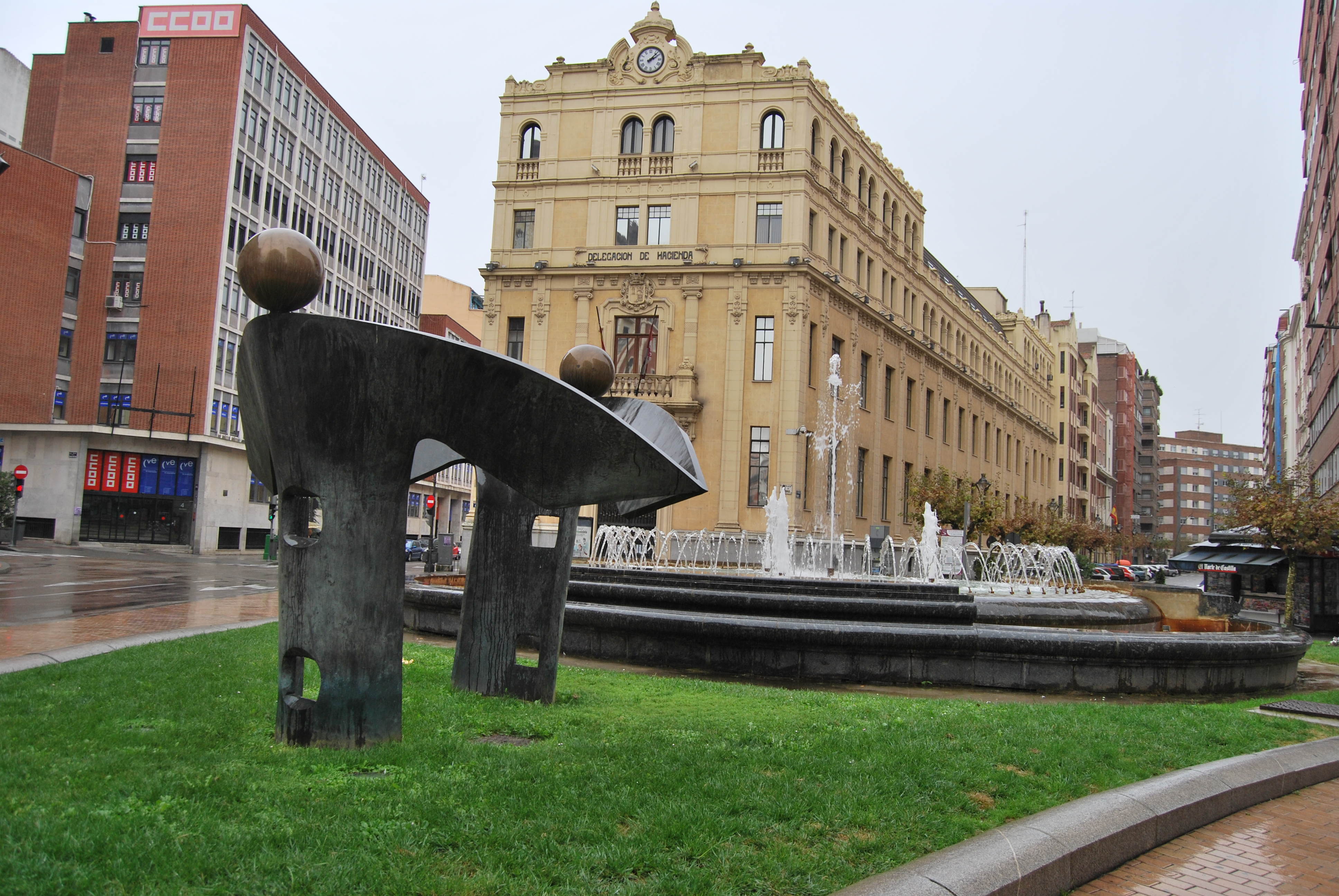 Escultura en bronce realizada por Feliciano Álvarez Buenaposada, en el año 1997, situada en la Plaza de Madrid de Valladolid ( España)